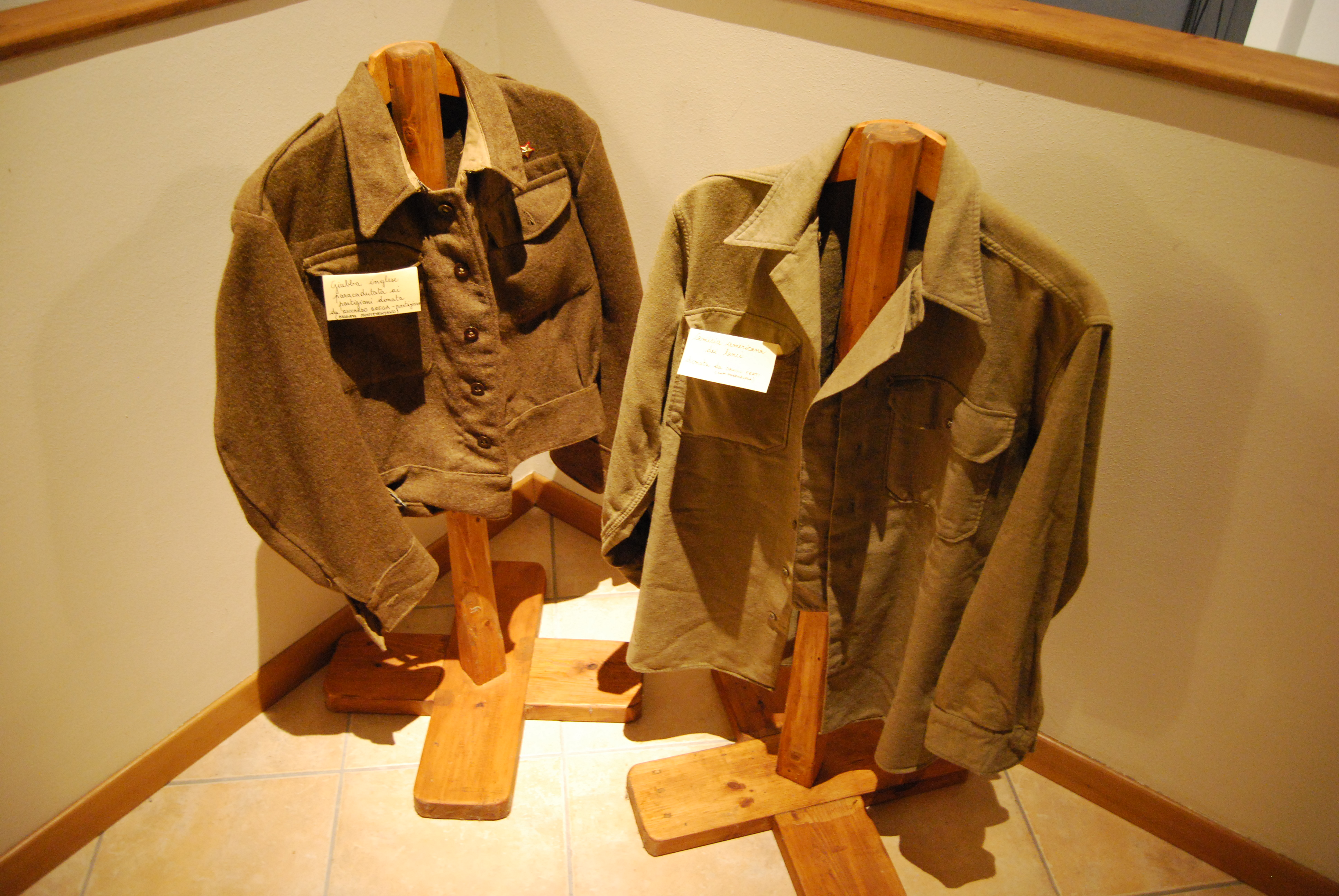 GFDL